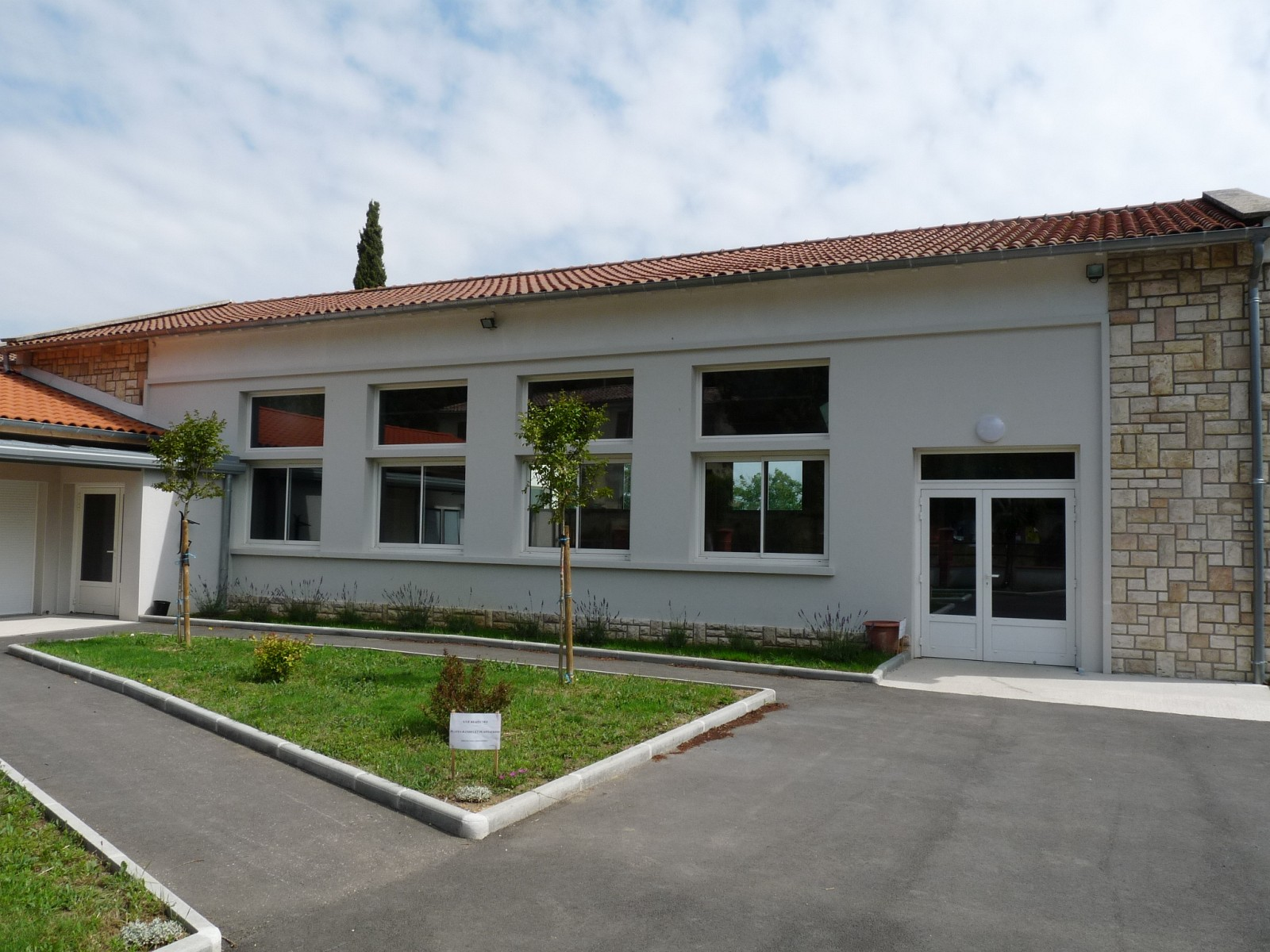 Salle des fêtes, Caragoudes, Haute-Garonne, France